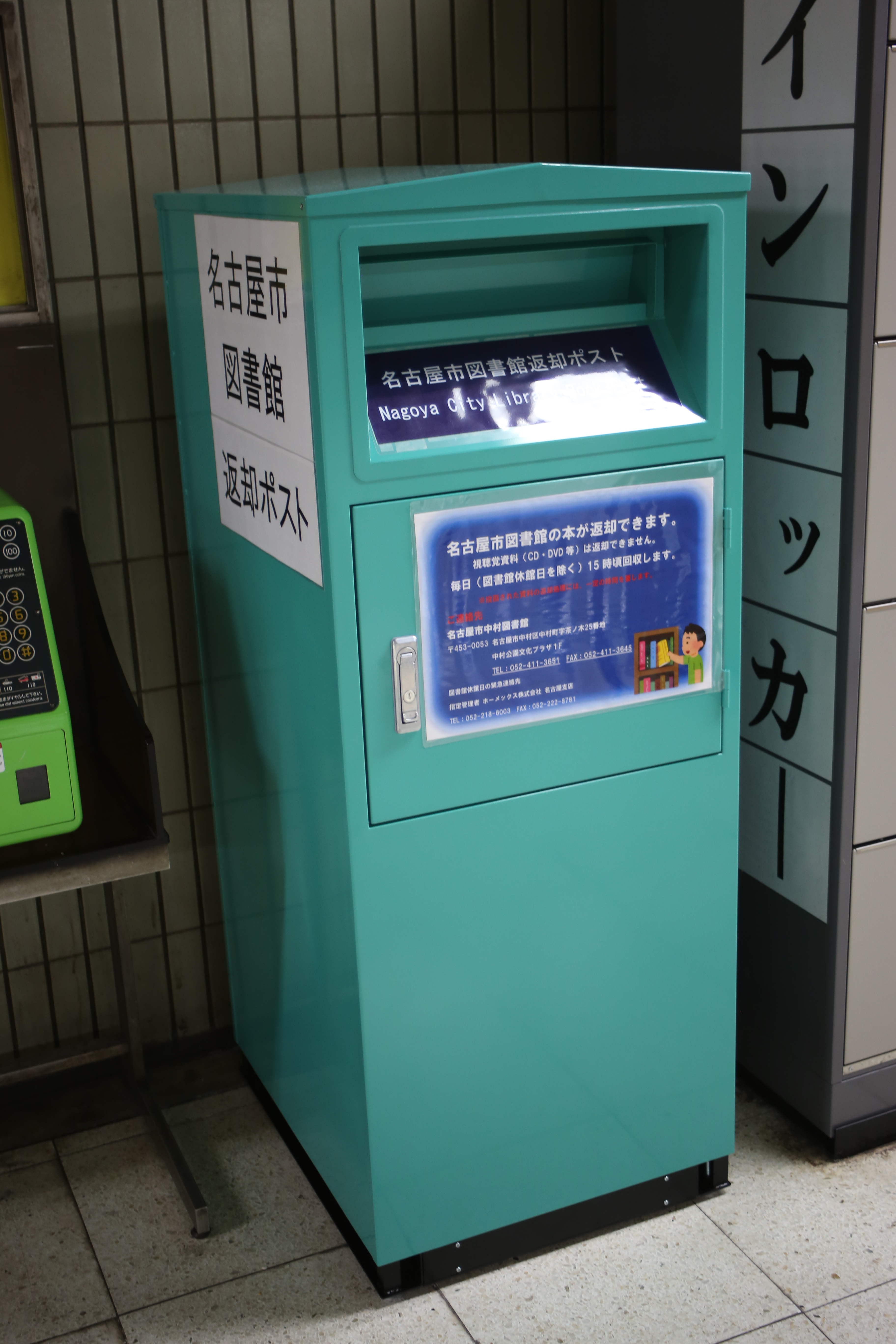 名古屋市営地下鉄東山線中村公園駅